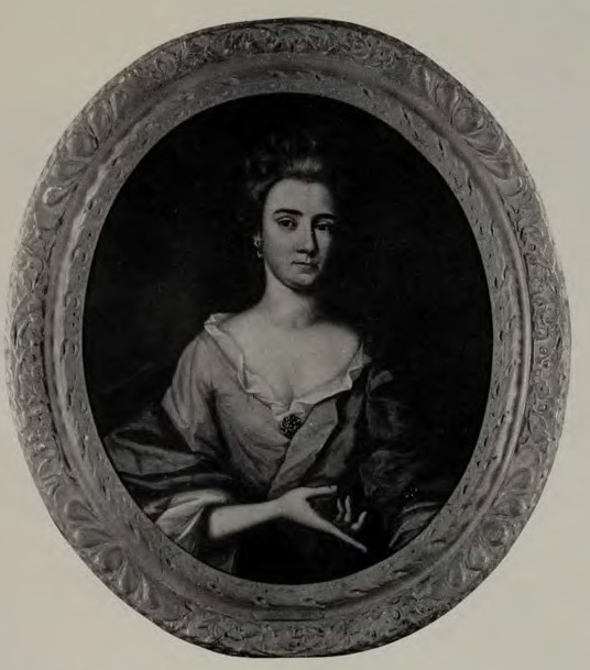 12 pages 26 cm